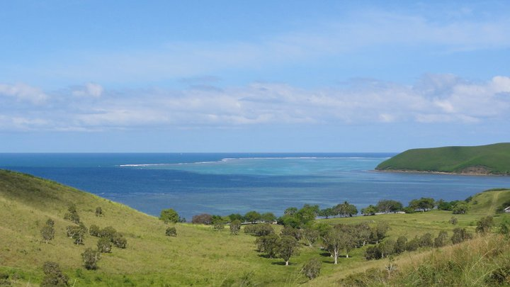 Vue sur la Passe Popinée